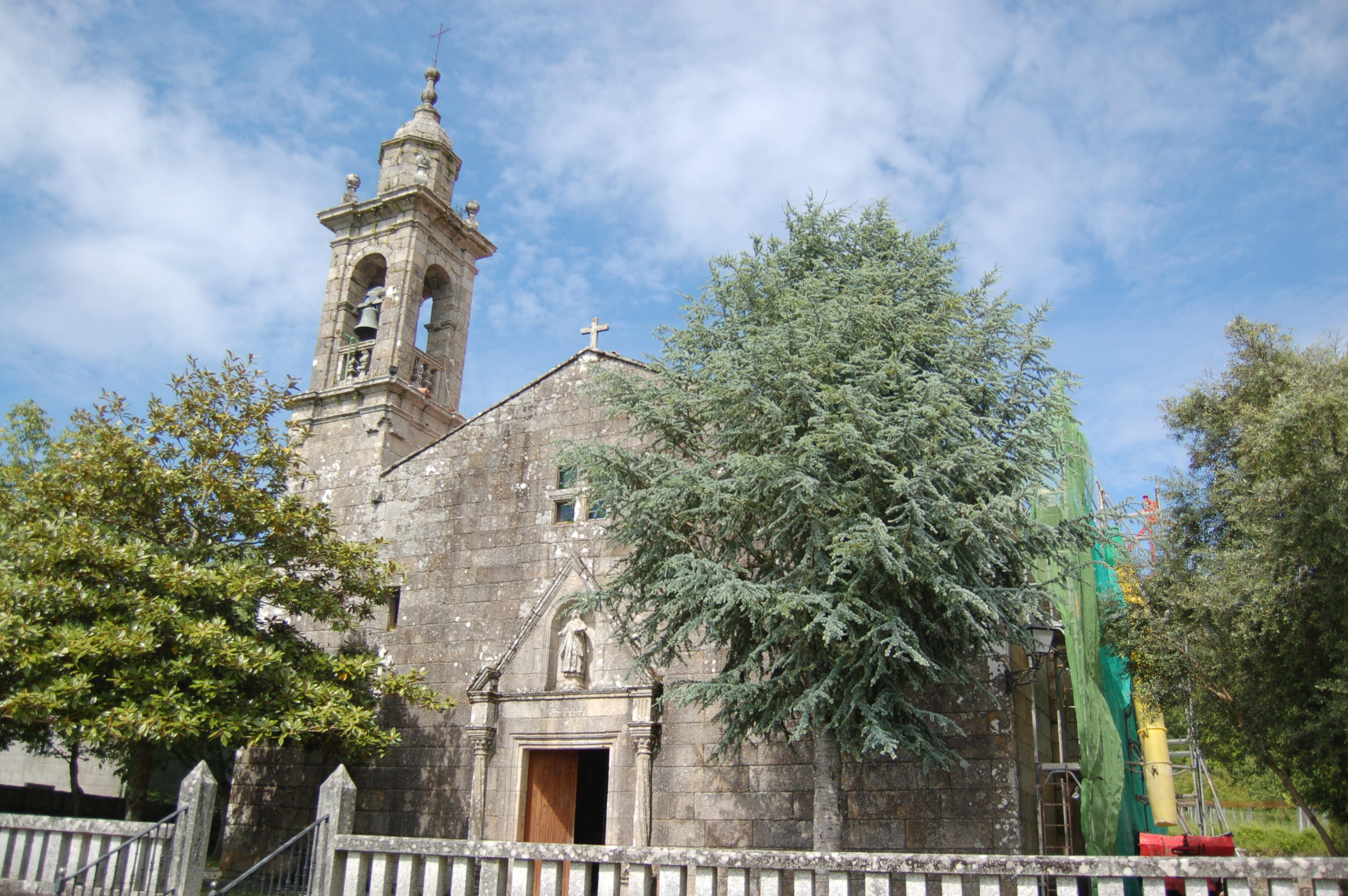 Igrexa parroquial de Santa Mariña de Arcos da Condesa (Caldas de Reis)